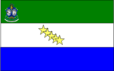 Bandera del Municipio Colón, Zulia, Venezuela